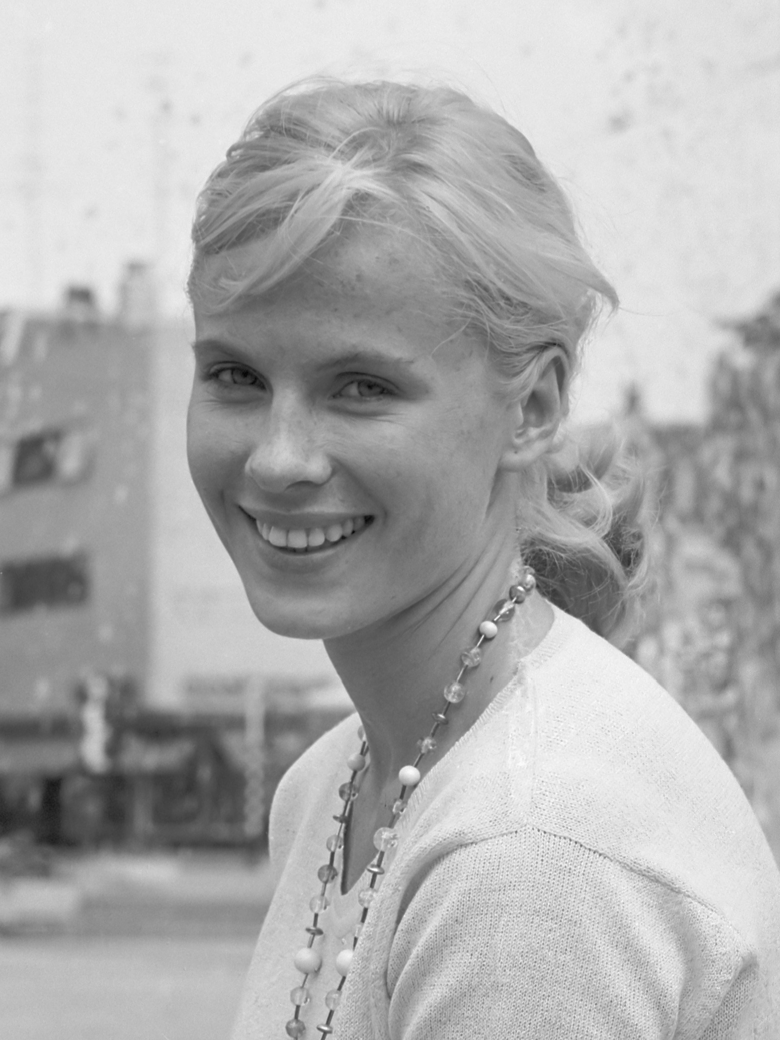 Filmweek Arnhem. Filmactrice Bibi Andersson